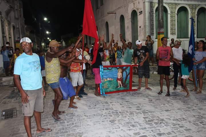 bshbdbndv